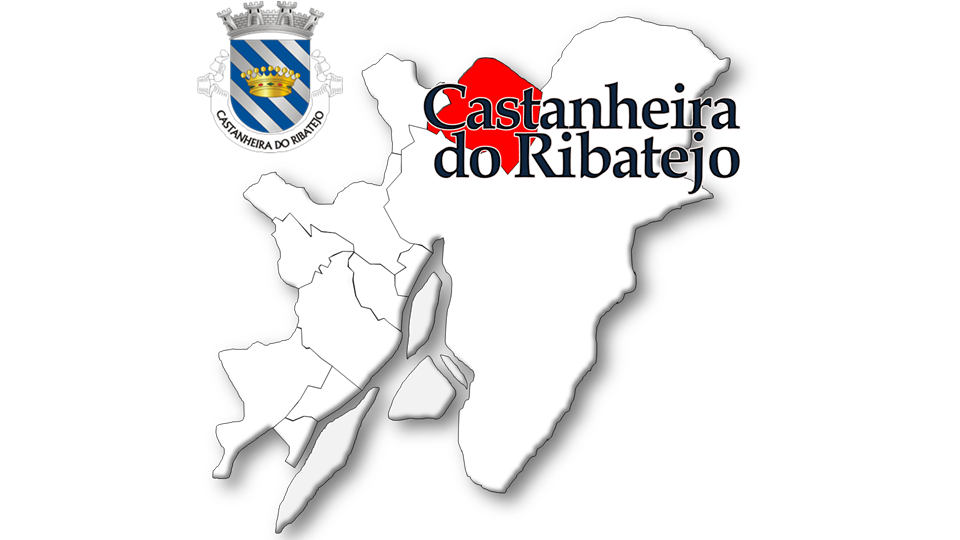 Evolução da População